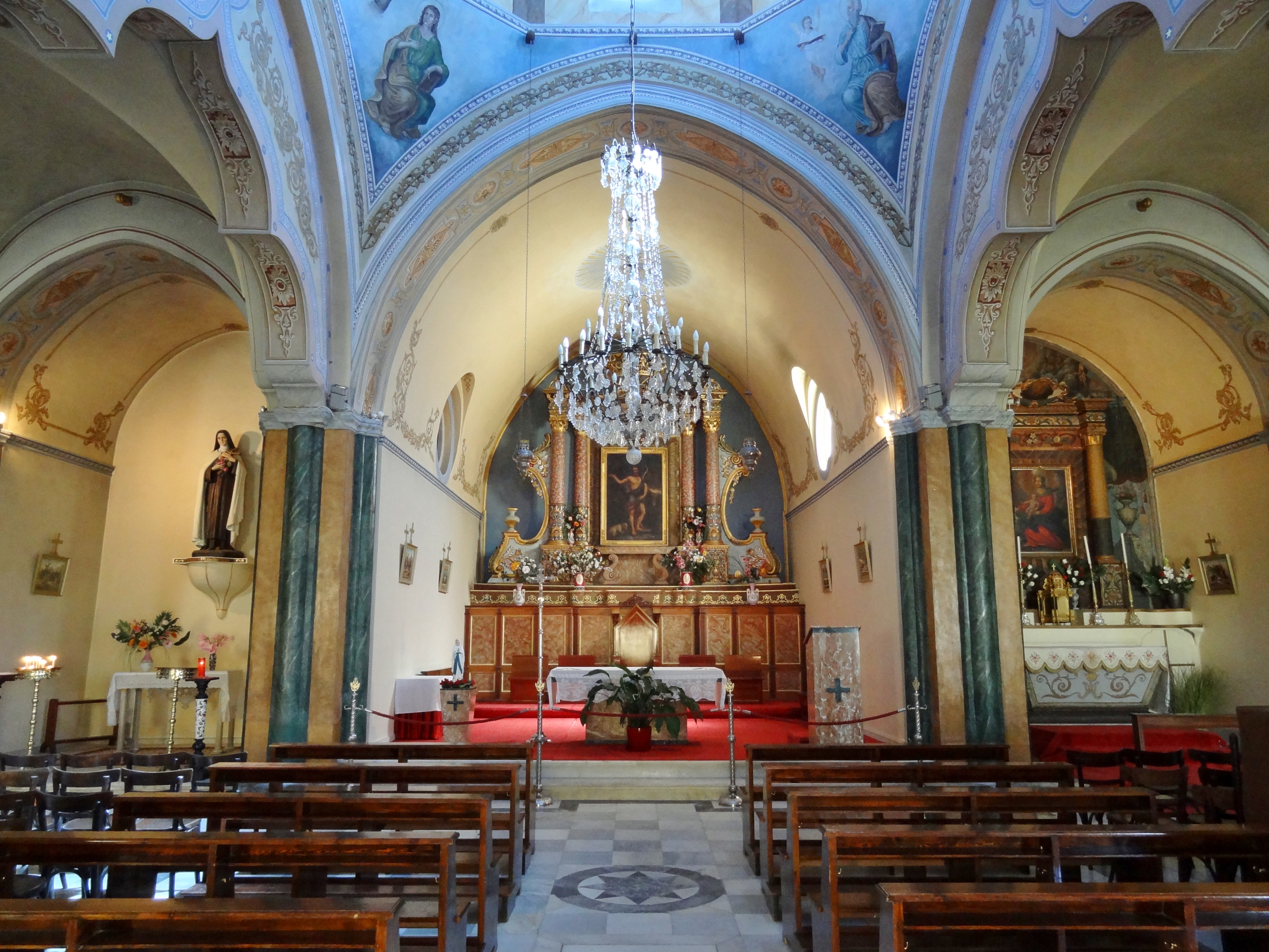 Katholische Kathedrale Johannes der Täufer in Fira auf Santorin, Kykladen, Griechenland